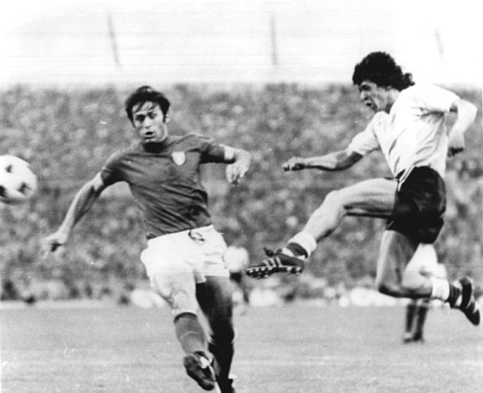 ADN-ZB-AP-Tele-19.6.74-ma-BRD-Stuttgart: X. Fußball-Weltmeisterschaft-1. Finalrunde, Gruppe 4: Argentinien - Italien 1:1- In der 19. Spielminute erzielt René Orlando Houseman (recht) mit einem gekonnten Schuß aus der Luft das 1:0 für Argentinien. Der Italiener Tarcisio Burgnich (links) kommt zu spät.